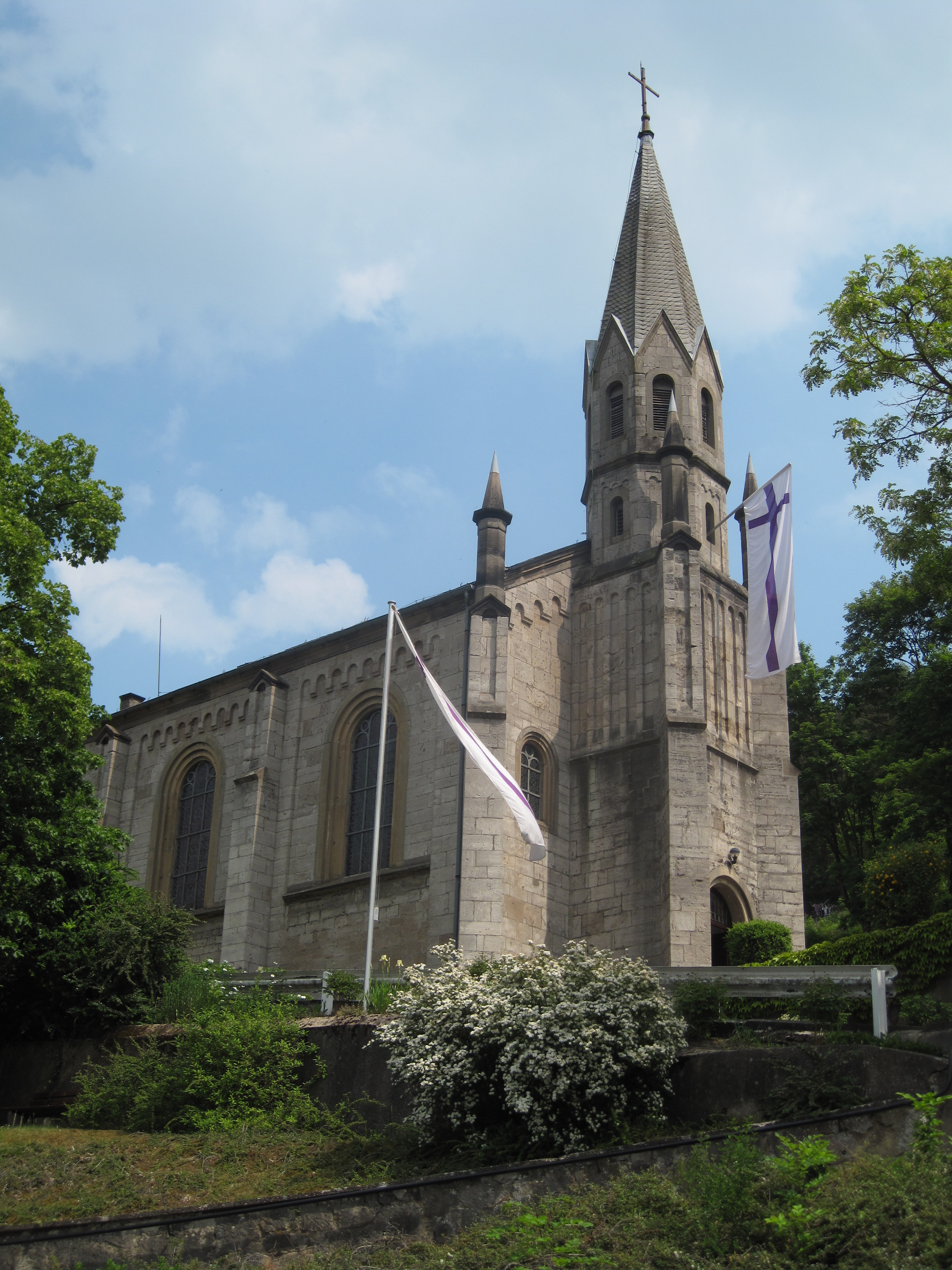 Evangelische Emmauskirche, Niedermarsberg, Jittenberg 7. Erbaut 1856 bis 1864, Denkmal.